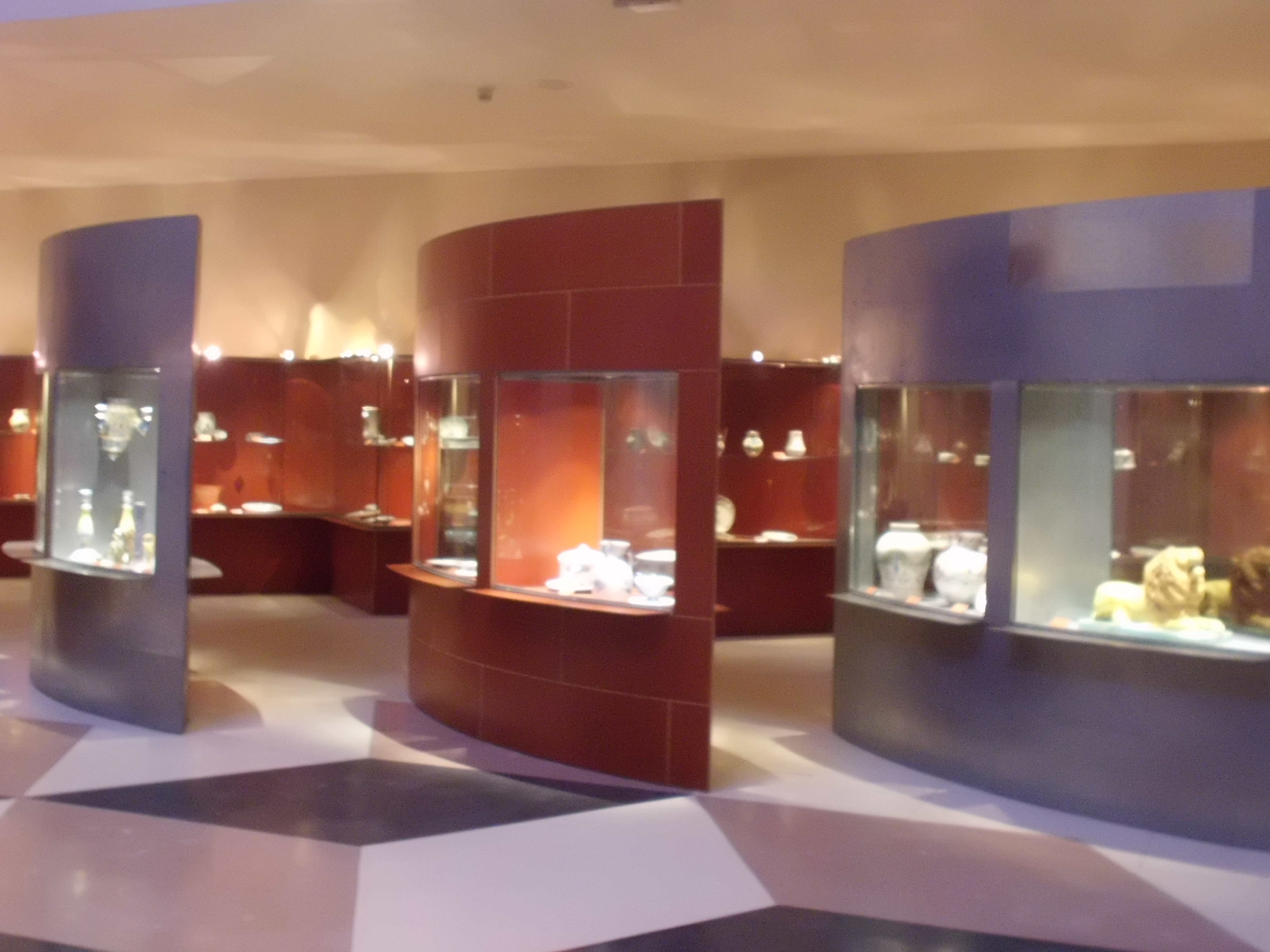 Museo de Cerámica Ruiz de Luna en Talavera de la Reina.